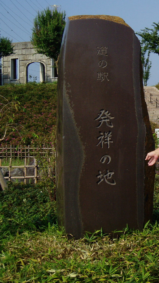 道の駅第1号記念碑。